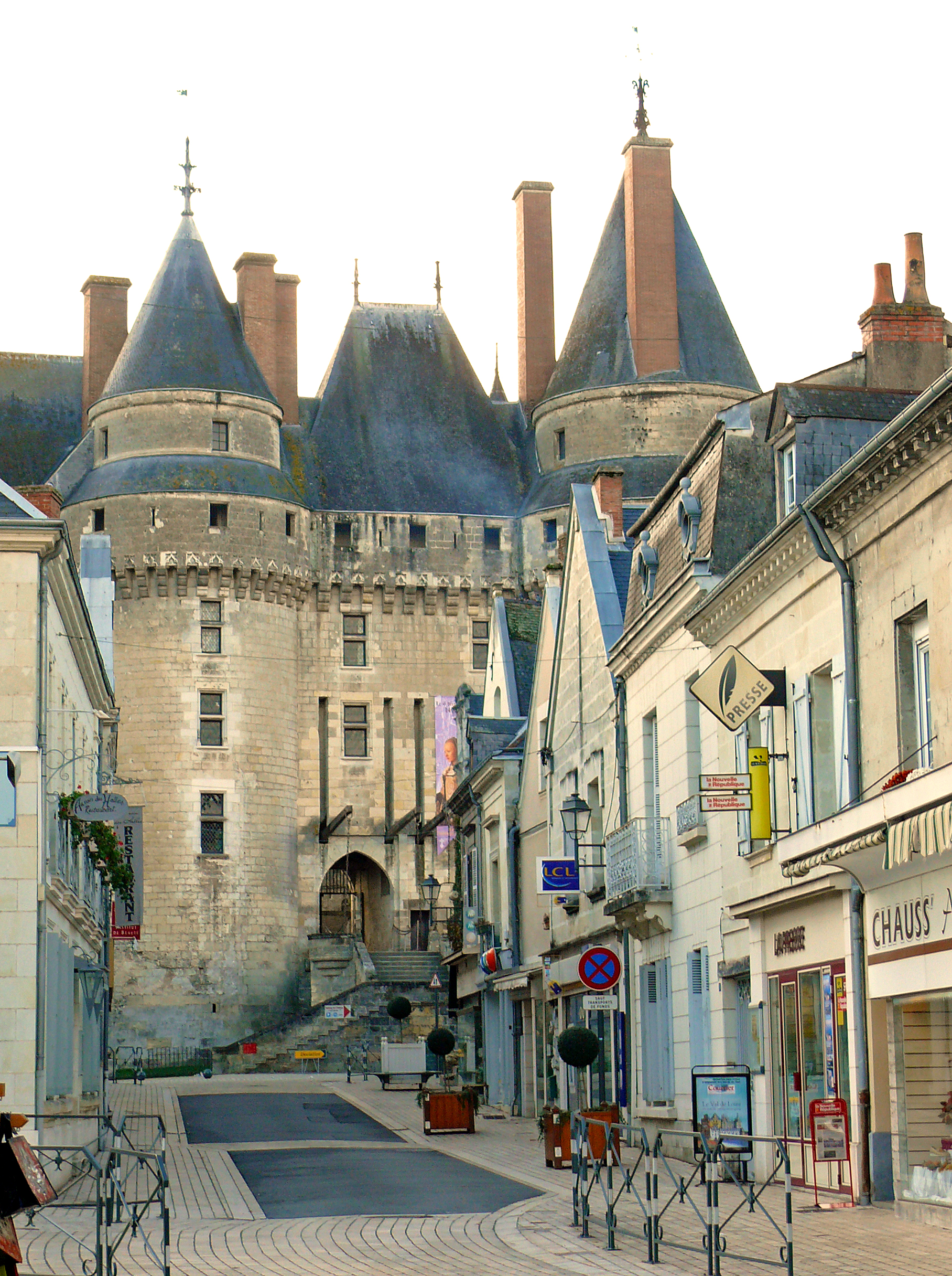 Le Château de Langeais se trouve au débouché de la rue Thiers, l'axe principal de la ville.